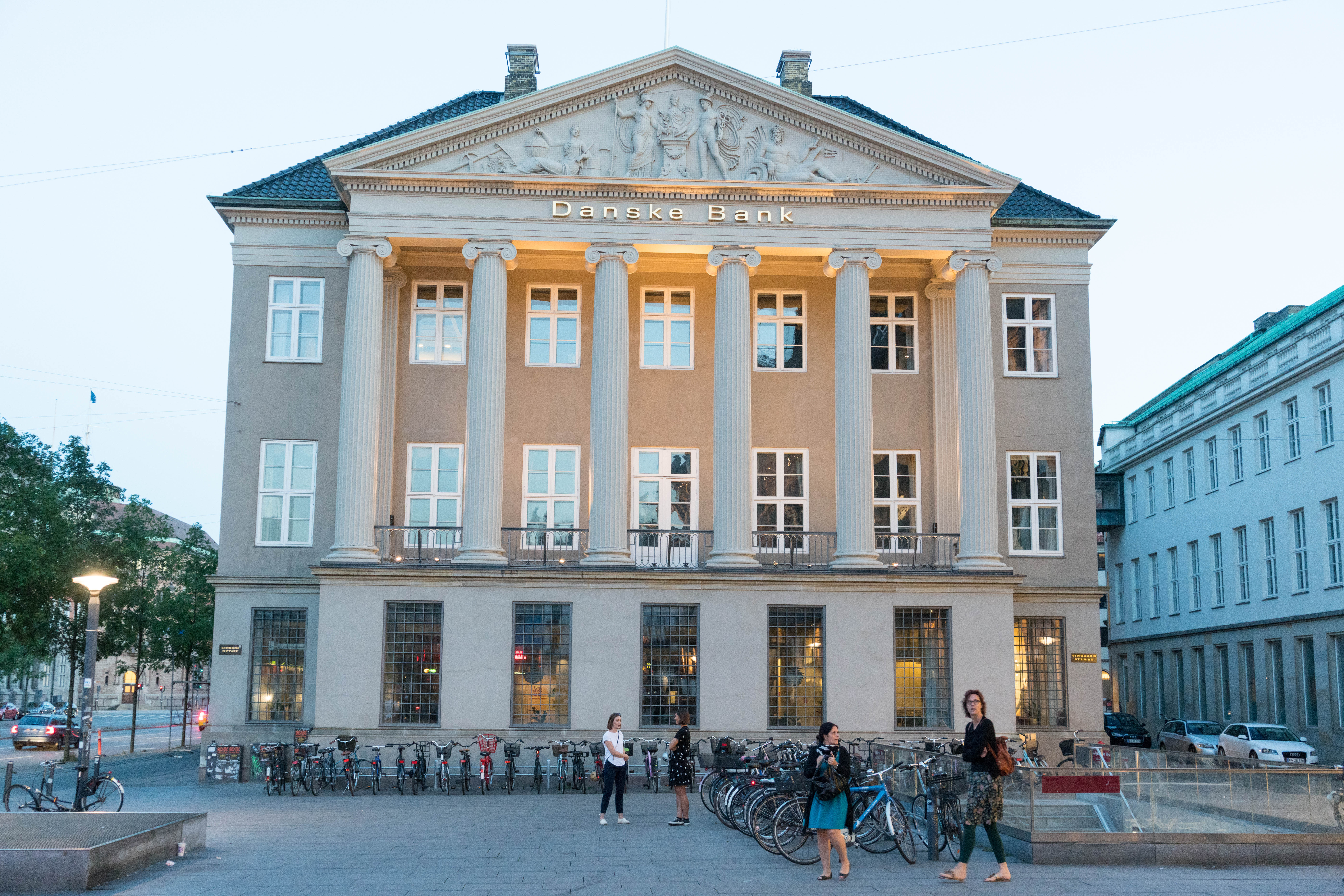 Danske Bank headquarters in Copenhagen, Denmark